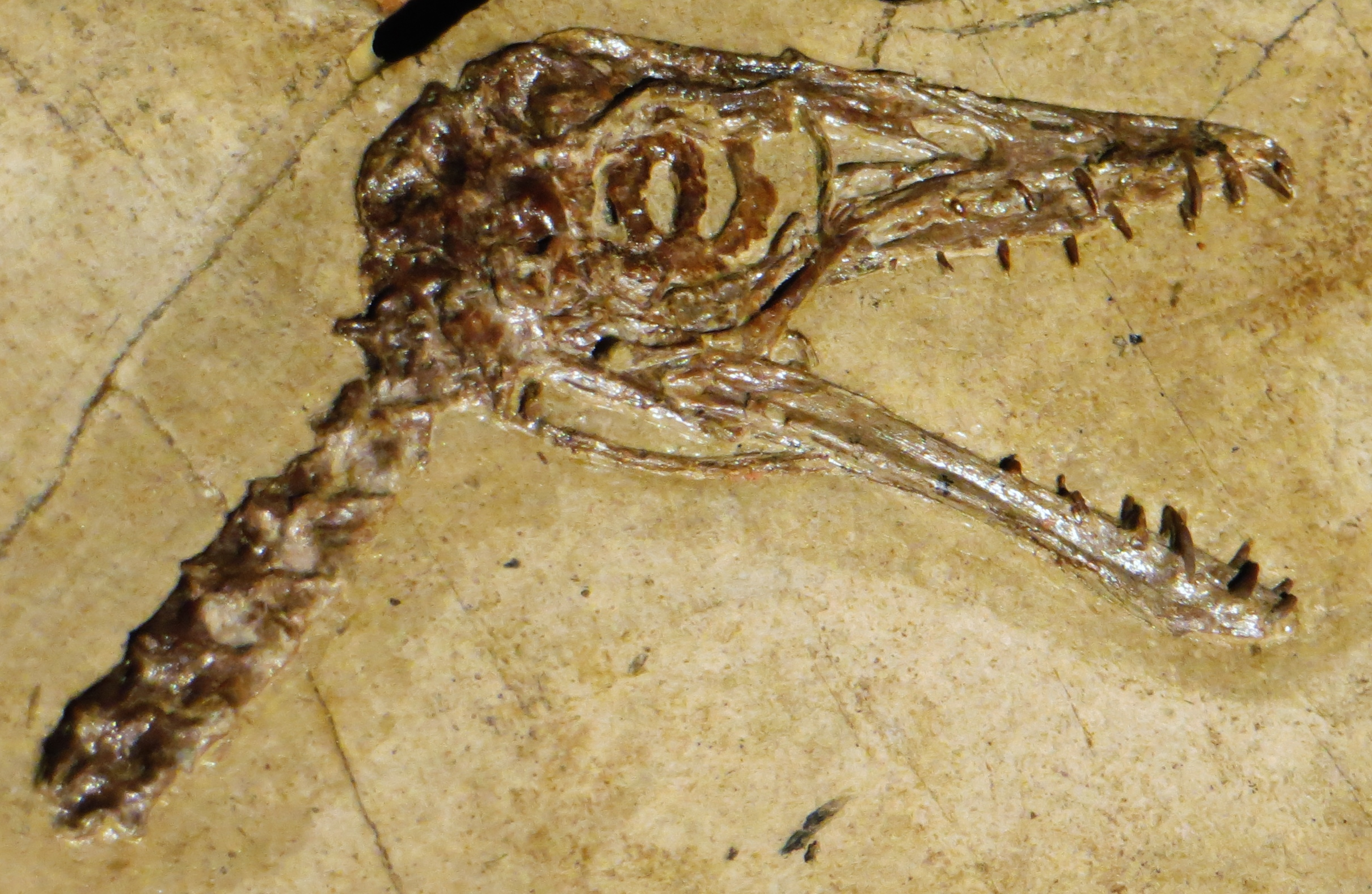 Fossil of Sordes, an extinct reptile- Took the picture at Dinosaurium, Prague